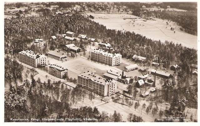 Vy över Västmanlands regemente, Västerås